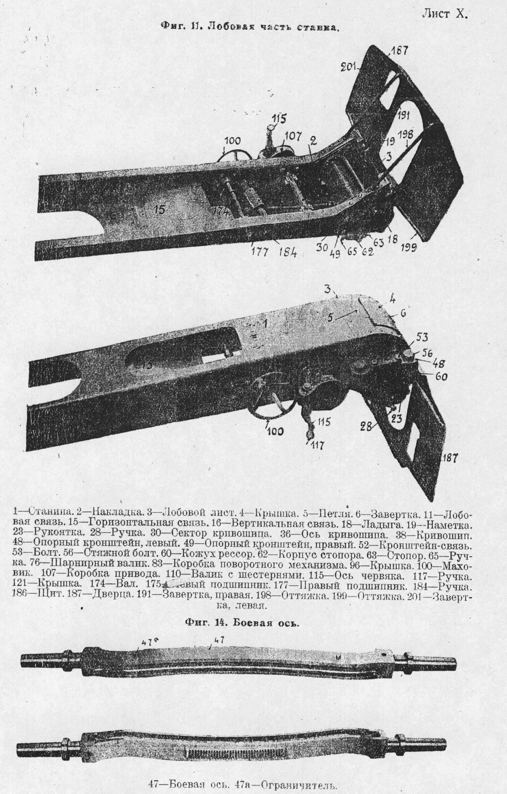 Лобовая часть станка 76-мм полковой пушки обр.1927 г.